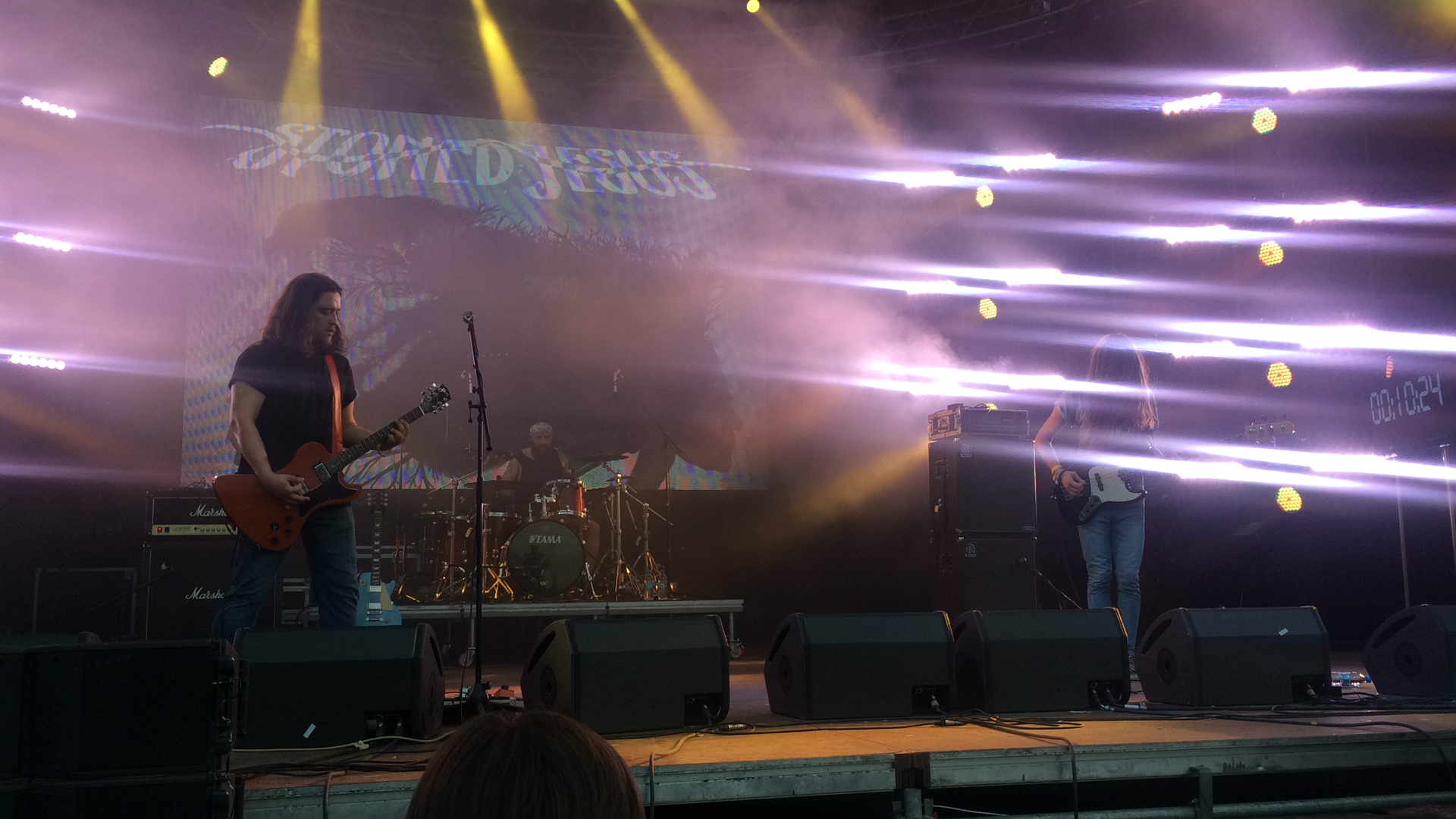 Atlas Weekend 2017. Виступ Stoned Jesus